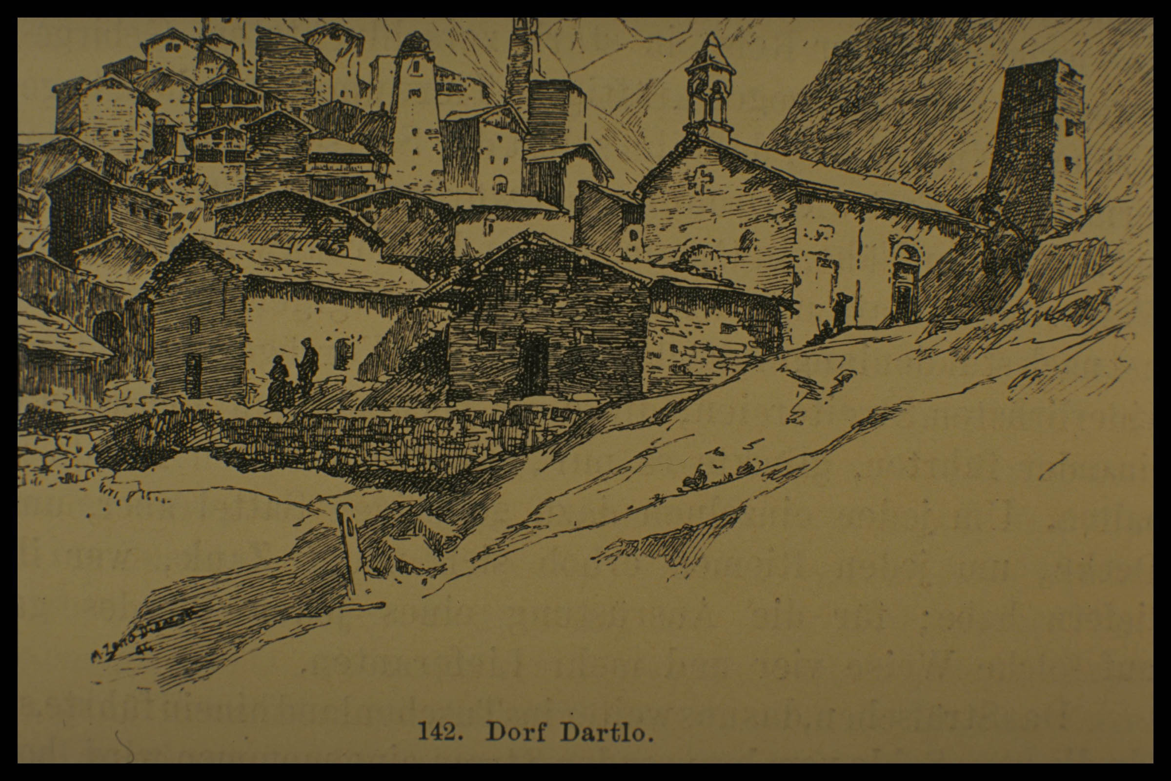 გოტფრიდ მერცბახერის წიგნიდან "კავკასიის მაღალი რეგიონებიდან", გამოცემული 1901